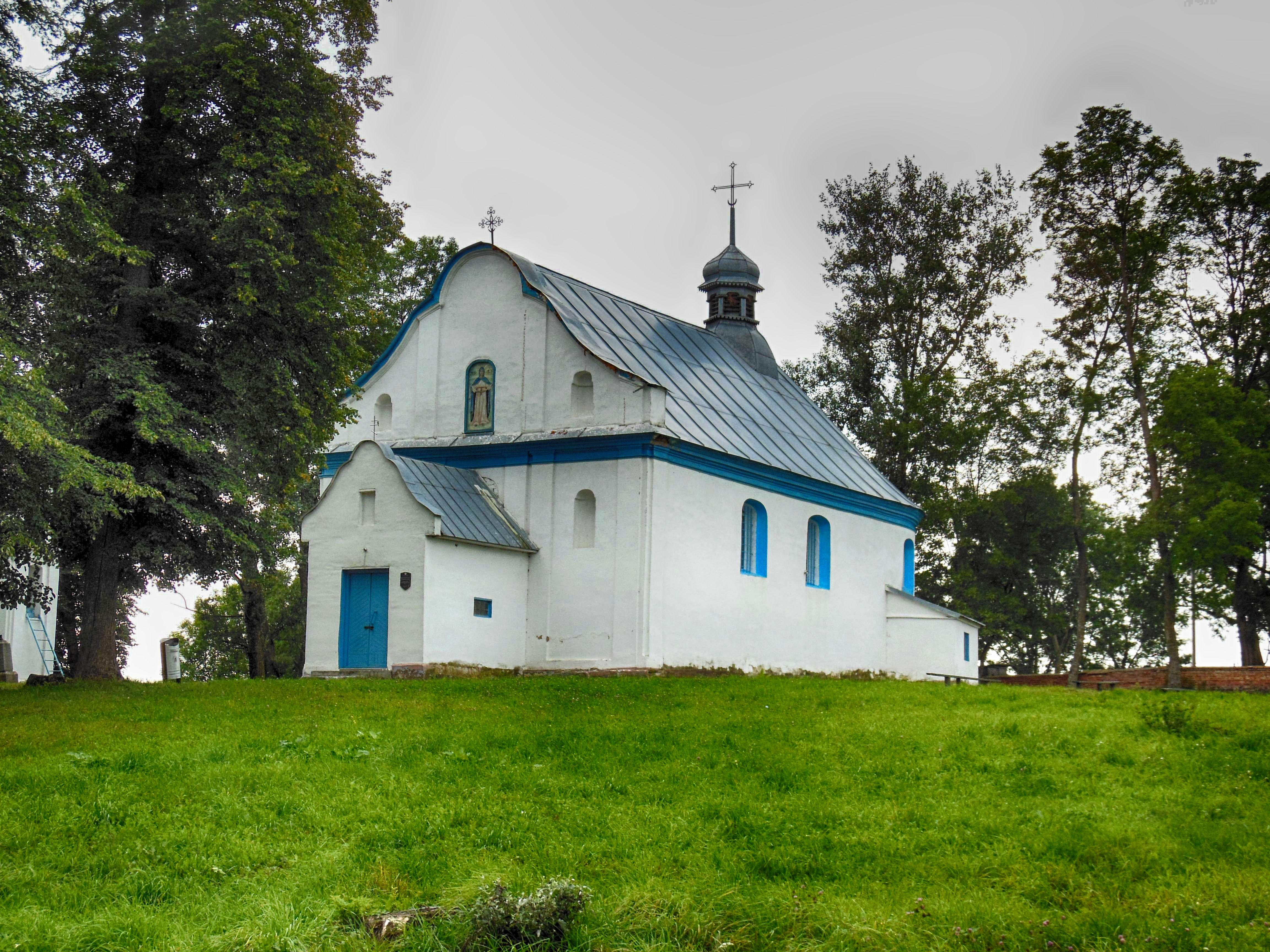 Беларуская (тарашкевіца): Сьвята-Пакроўская царква. в. Вялікая Ліпа This is a photo of Belarusian heritage monument. Reference number: 613Г000485 ( WLM)